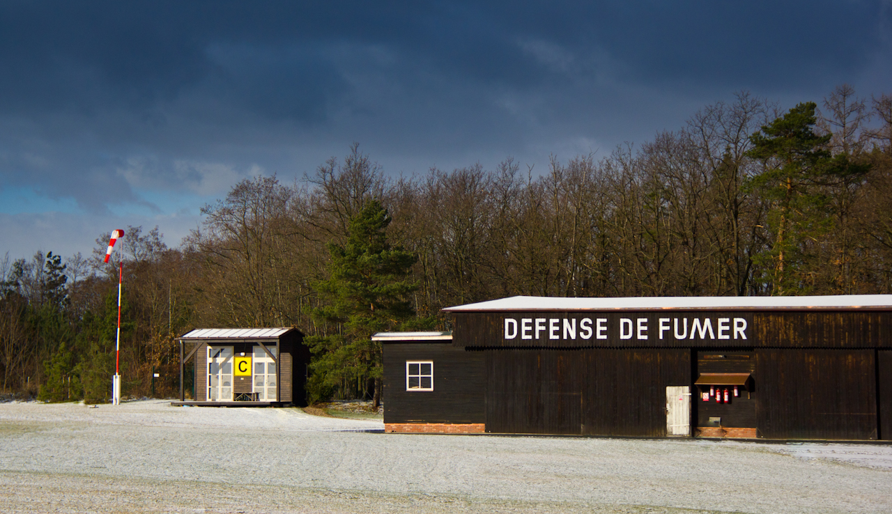 Letiště Praha Točná